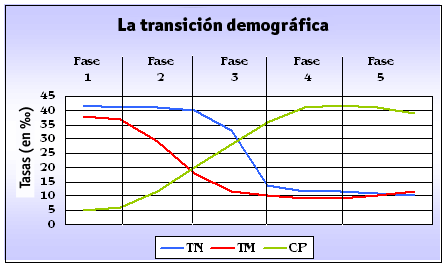 Gráfica castellanizada a partir de la original Image:Transició demogràfica.png, obra de User:Xadaga